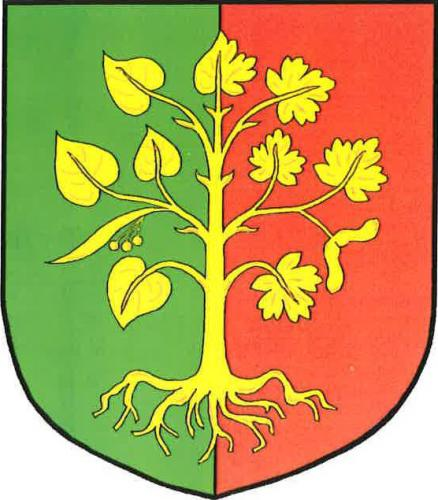 Chleny, znak obce